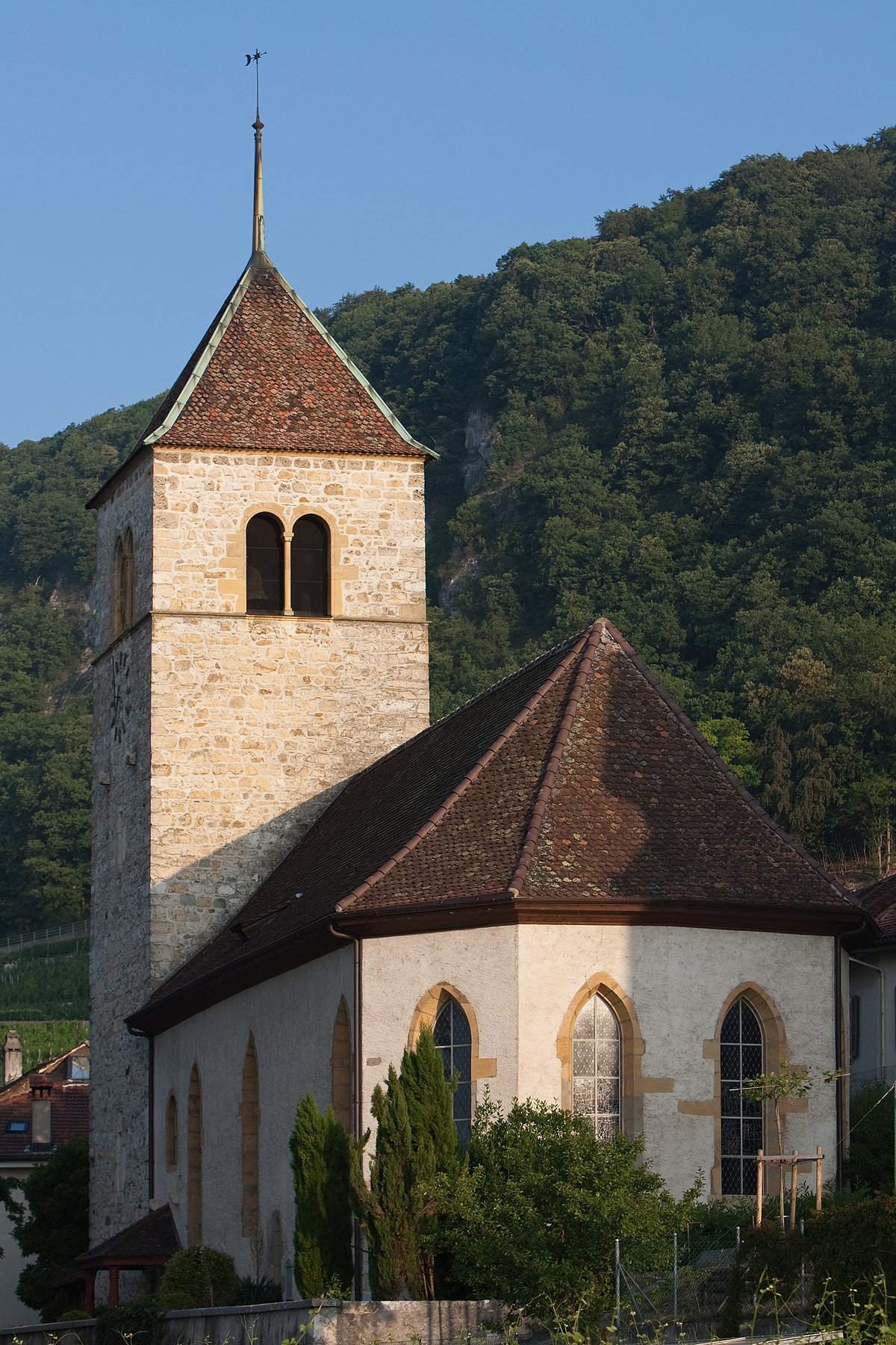 Reformierte Kirche in Twann (BE)